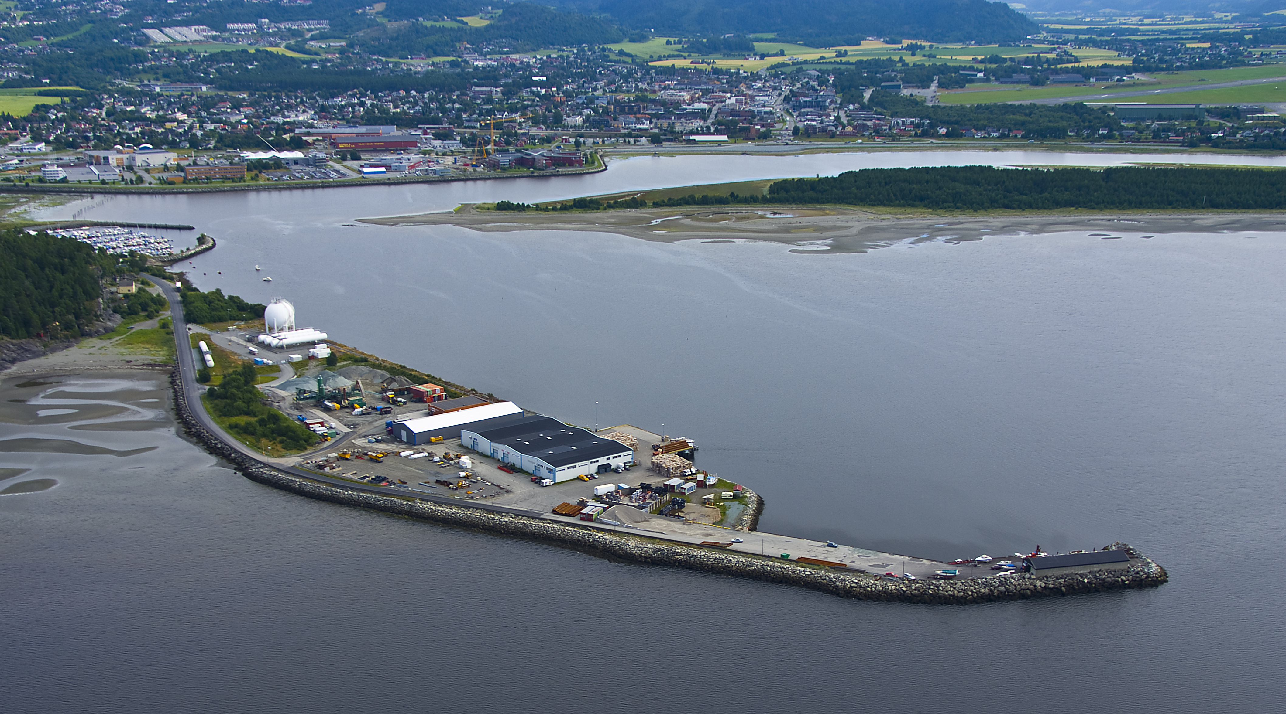 Stjørdal Havn